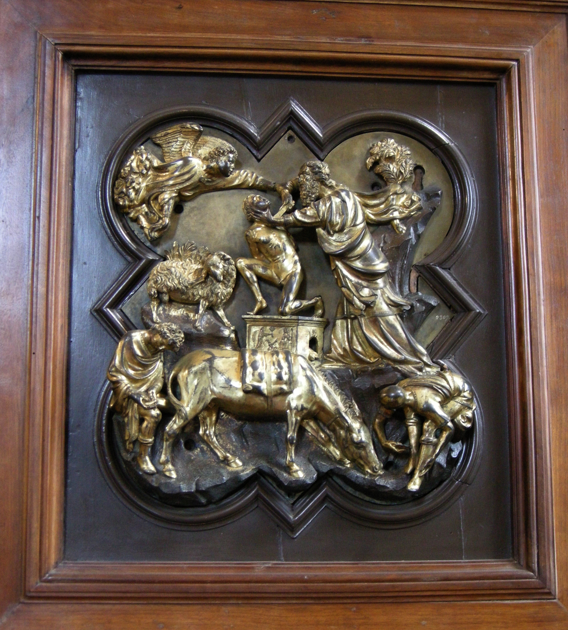 formella per il concorso delle porte del battistero